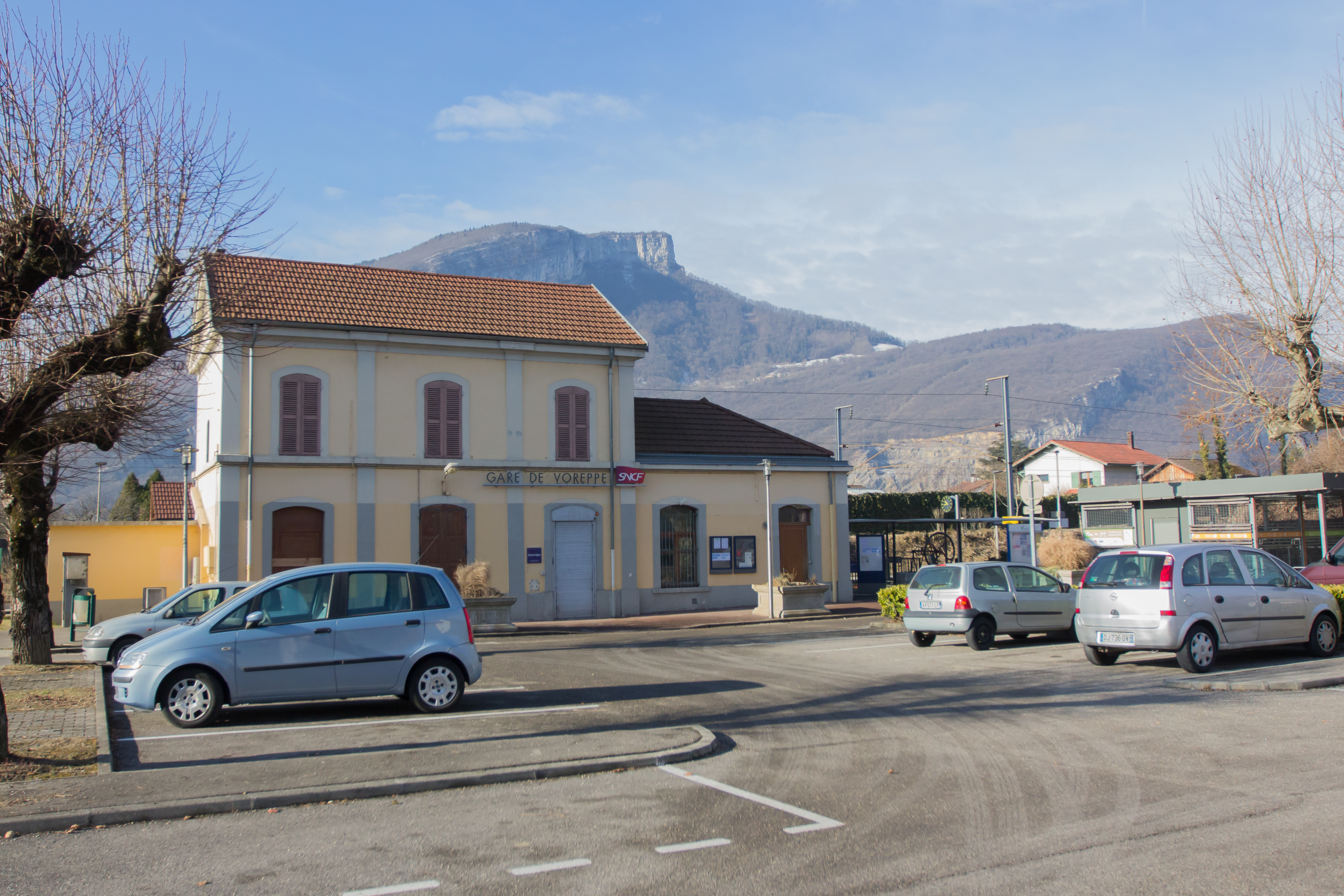 Gare de Voreppe (Voreppe, Isère, France)